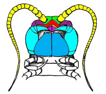 Brzuszna strona głowy drewnika widełkowca (Lithobius forficulatus). Żółty: czułki, zielony: płytka głowowa, czerwony: nadustek, różowy: szczęki I pary; fioletowy: szczęki II pary; niebieski: coxosterna szczękonóży; turkusowy: pozostała część szczękonóży